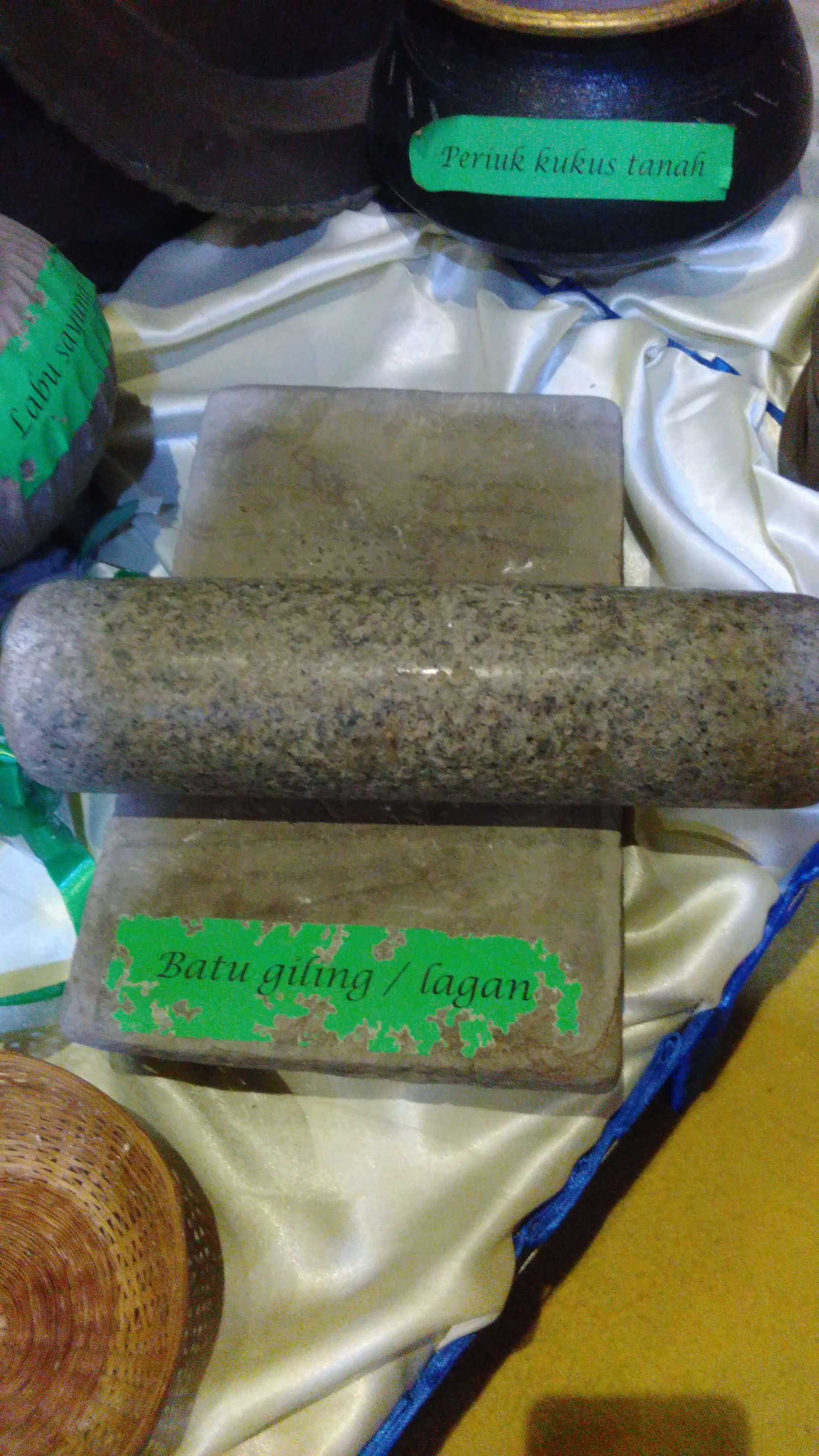 Batu Giling @ Lagan